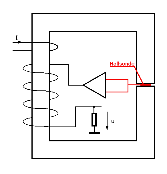 Skizze zur Beschreibung des Gleichstromwandlers